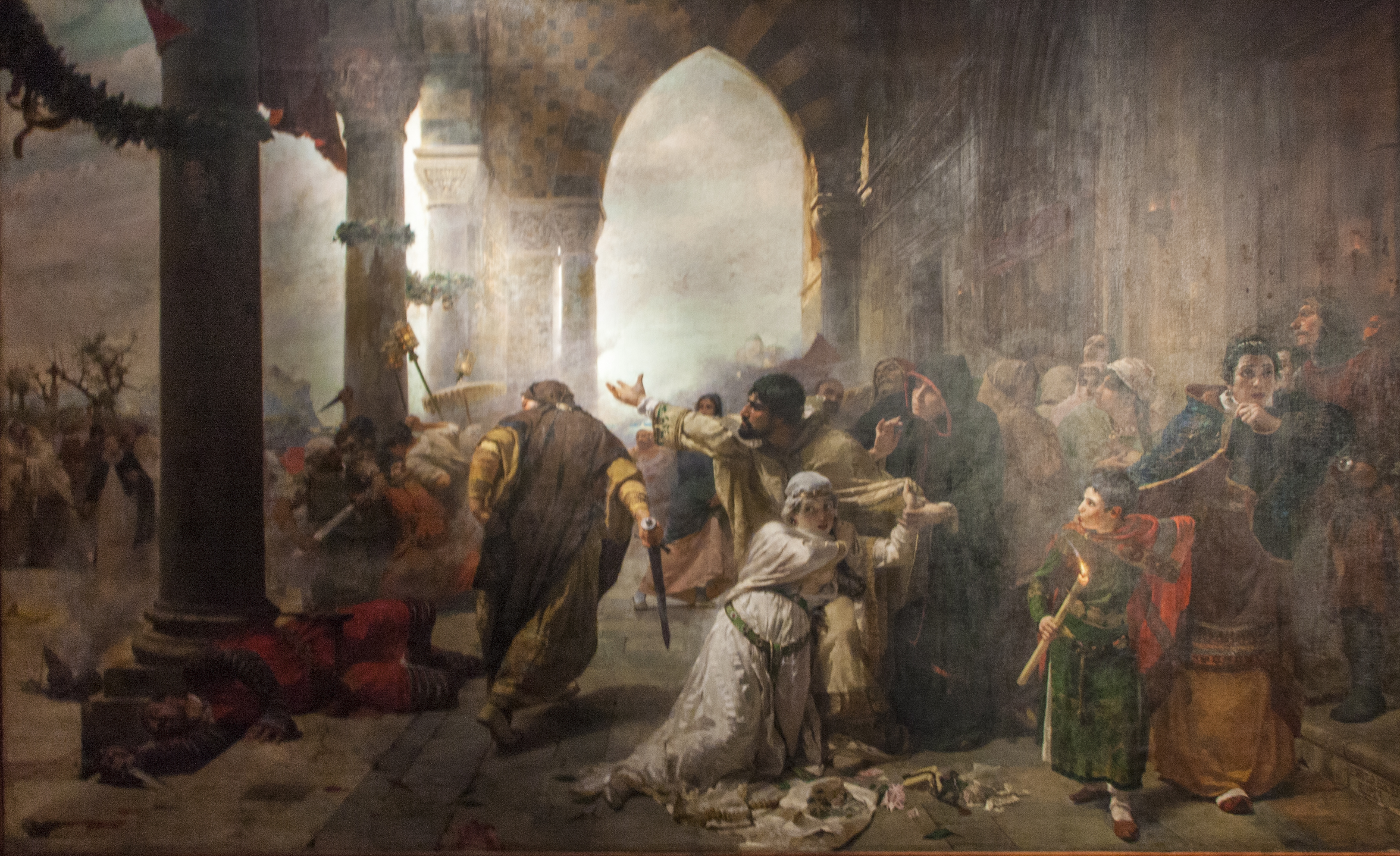 I vespri siciliani - Erulo Eroli Olio su tela 1890-1891 Acquisto del Comune di Palermo alla Esposizione Nazionale di Palermo 1891-1892